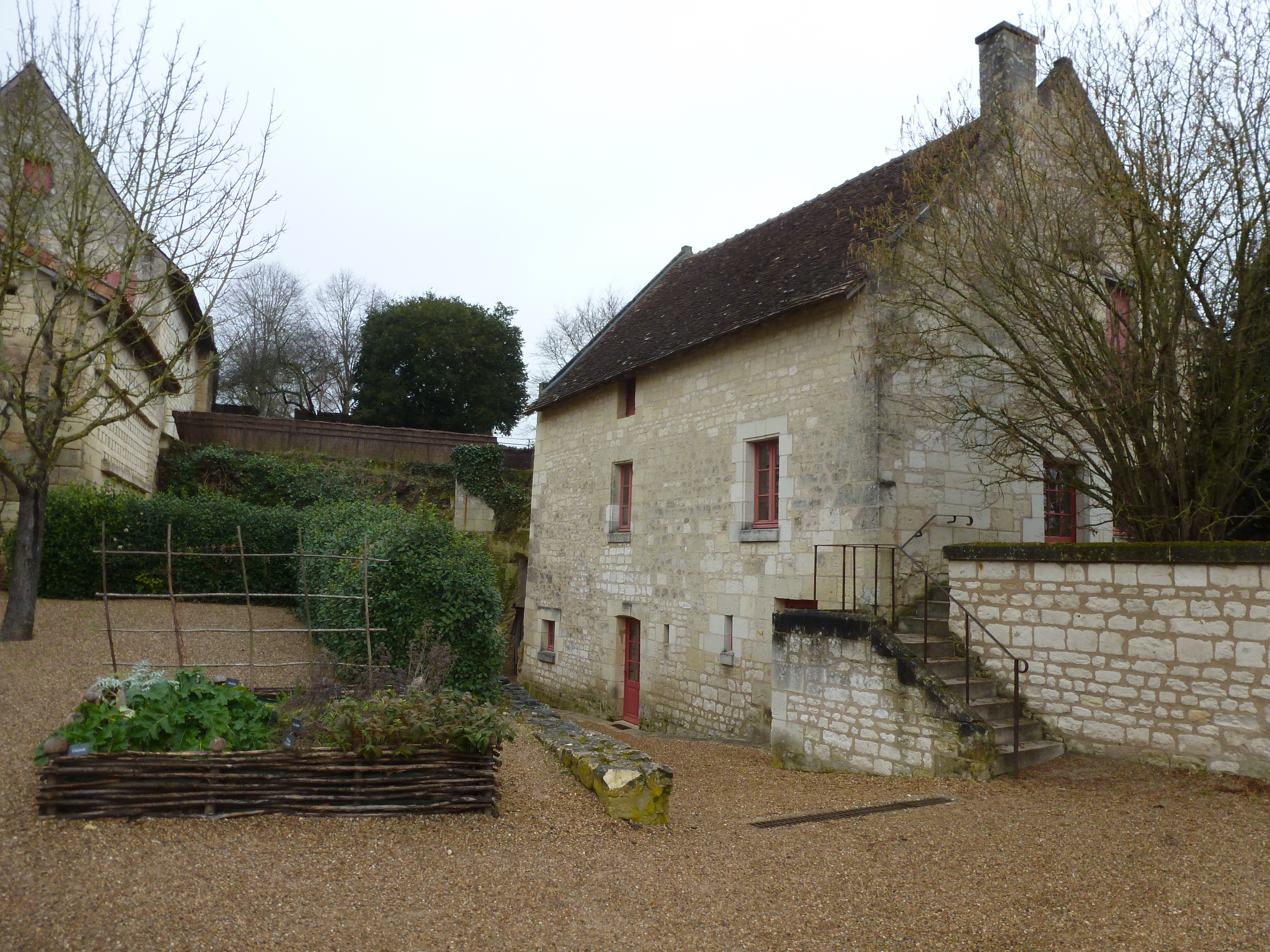 Édifice de la Devinière dans lequel serait né François Rabelais.